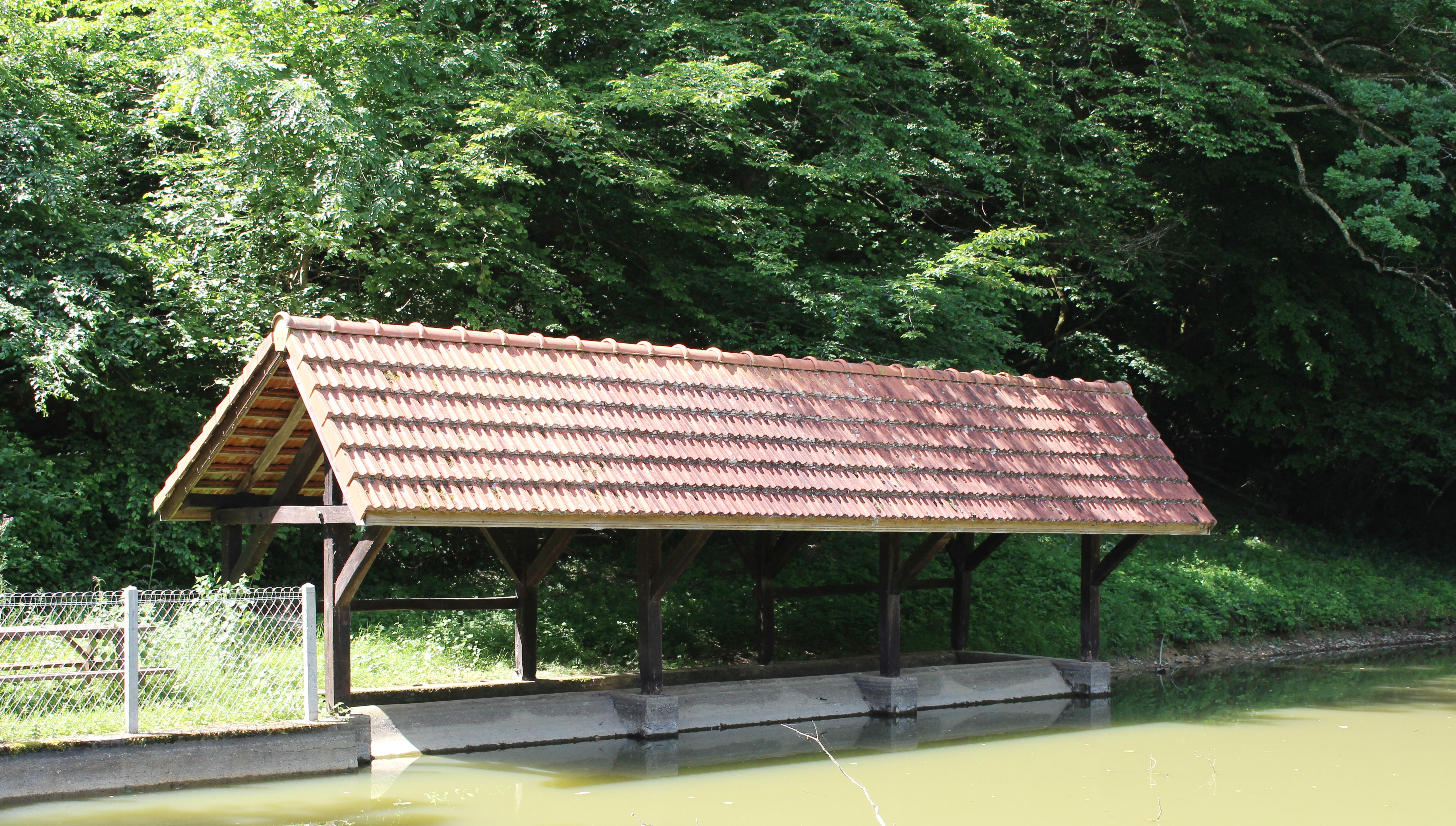 Lavoir de Bouilh-Péreuilh (Hautes-Pyrénées)